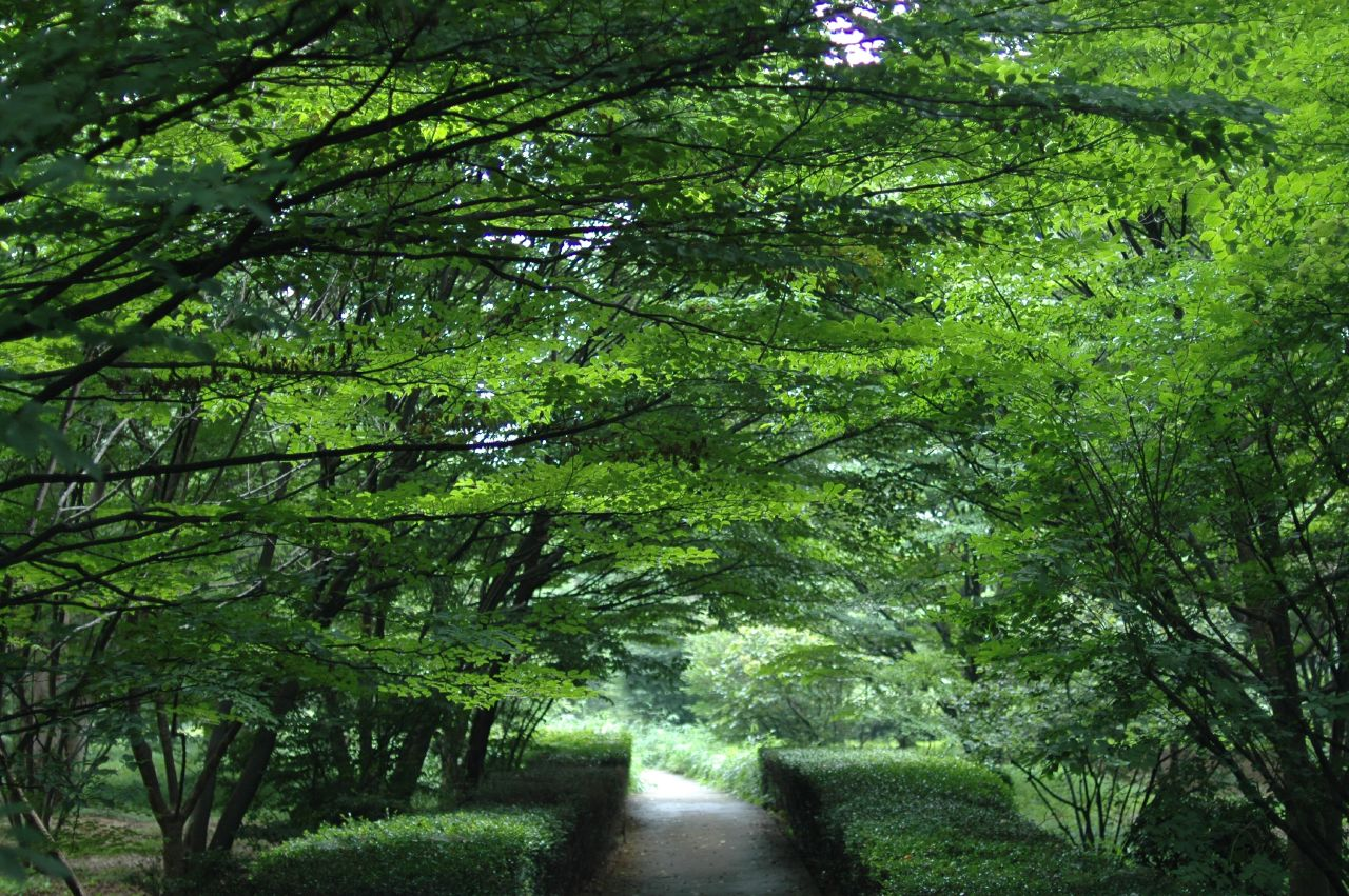 Kitanomaru Park in Tokyo.